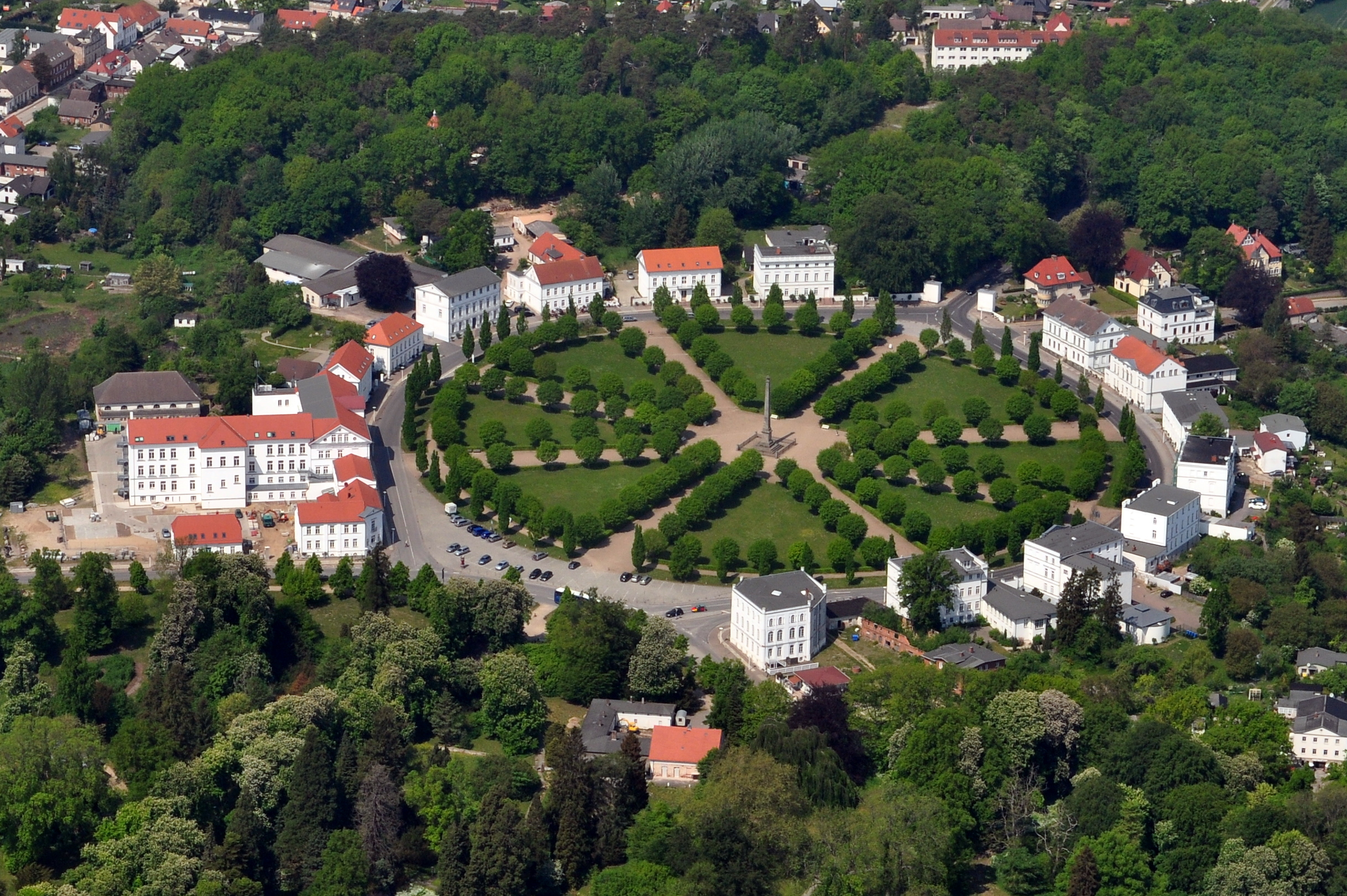 Die Bilder wurden von mir während eines einstündigen Rundflugs ab Flugplatz Güttin am 21. Mai 2011 aufgenommen. Die Bildbeschreibung steht im Dateinamen. Aufgenommen mit einer Nikon D5000 durch das Seitenfenster des Flugzeugs.